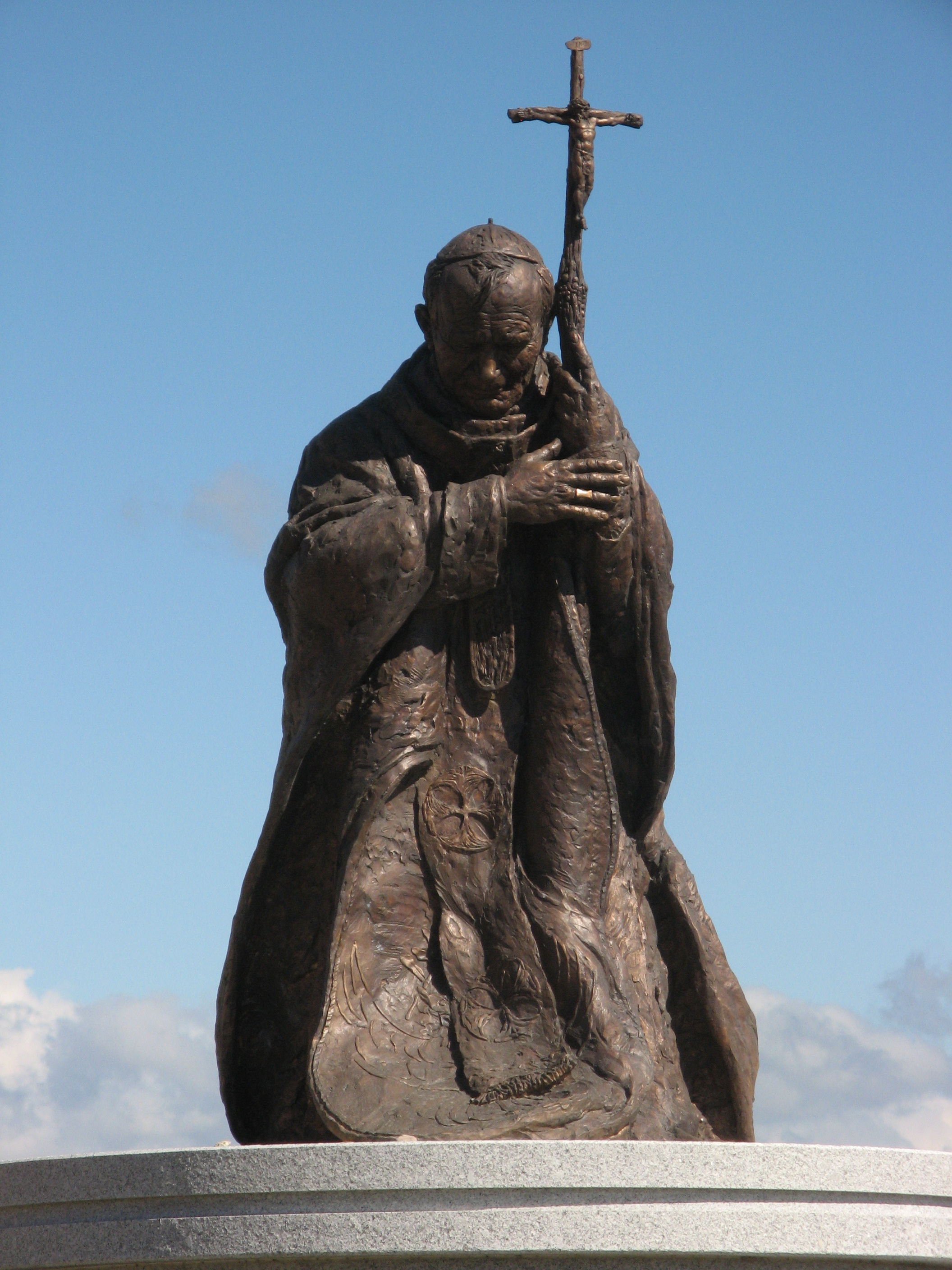 La ciudad de Alcalá al Papa Juan Pablo II Maestro de humanidad, testigo del Evangelio, hombre de esperanza y servidor de la paz. MMVI Monumento a Su Santidad Juan Pablo II en los jardines de Juan Pablo II. Alcalá de Henares. España - Spain